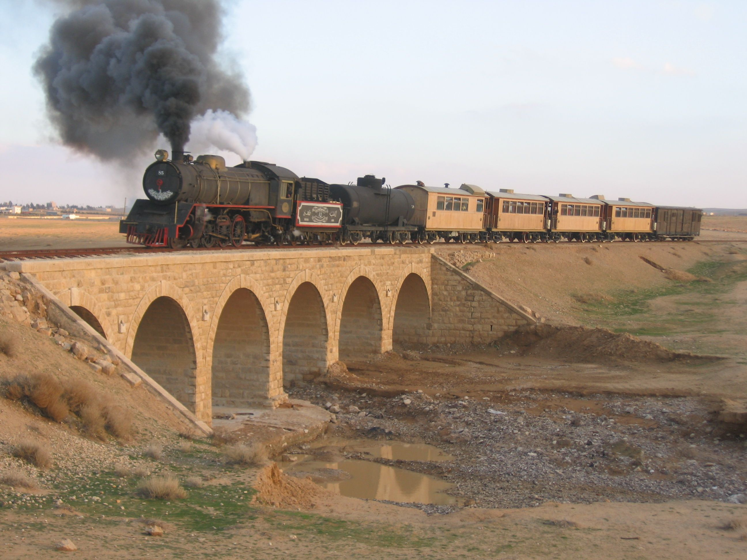 Brücke und Dampfsonderzug auf der Hedschasbahn